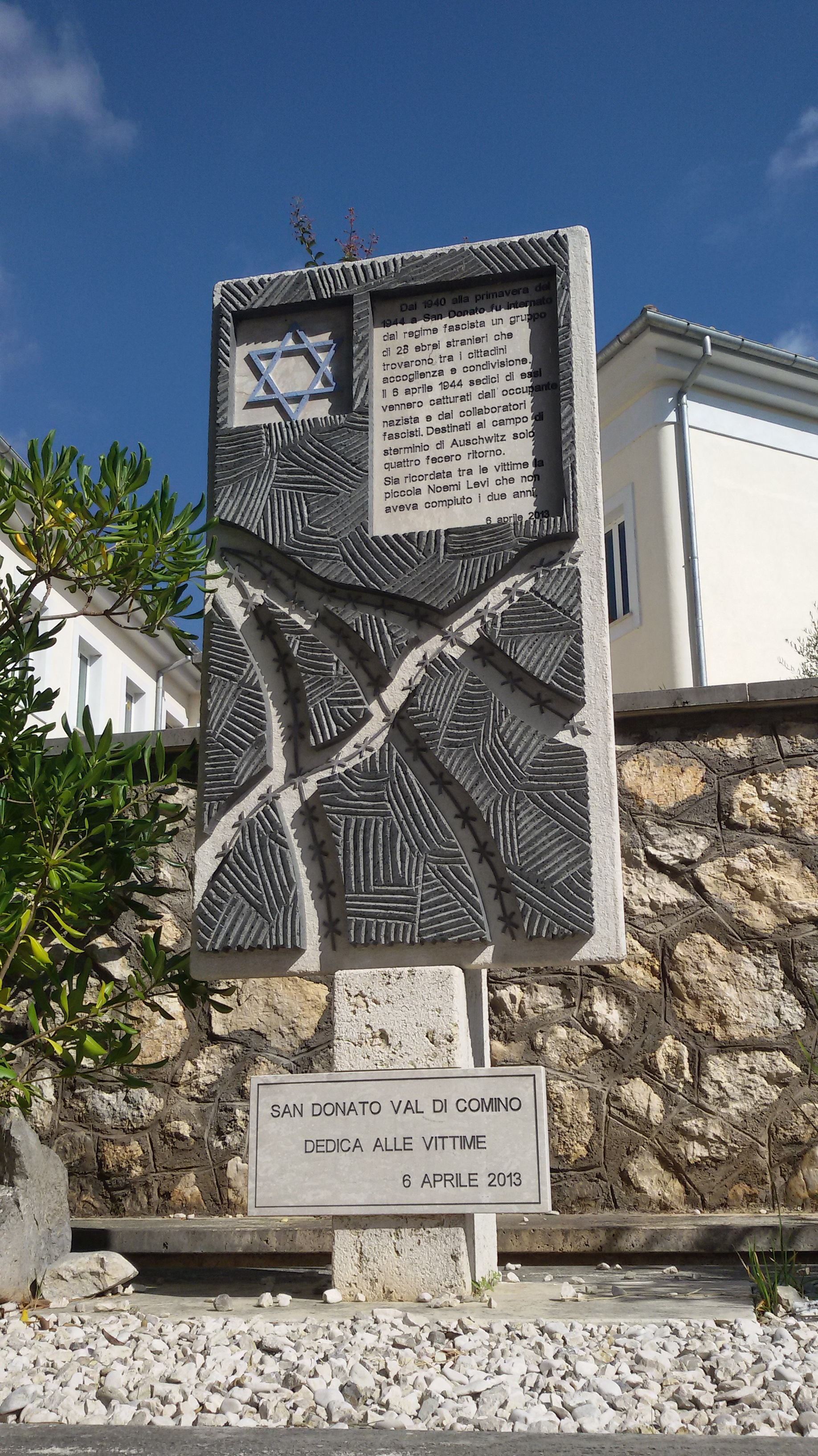 Opera di Giuliano Tullio